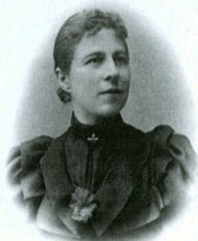 Vlasta Havelková (1857 - 1939), Česká etnografka.